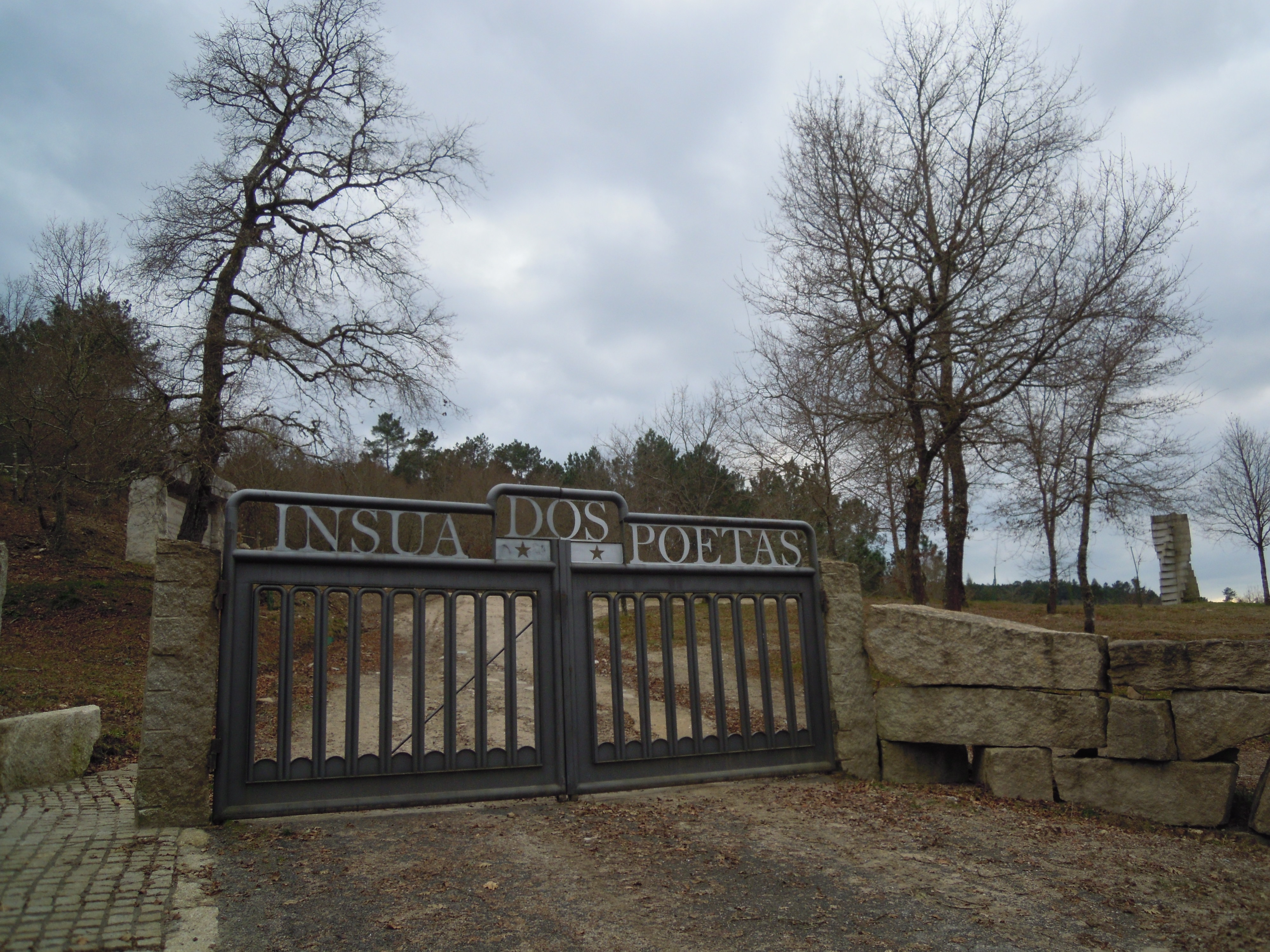 Entrada á Insua dos Poetas